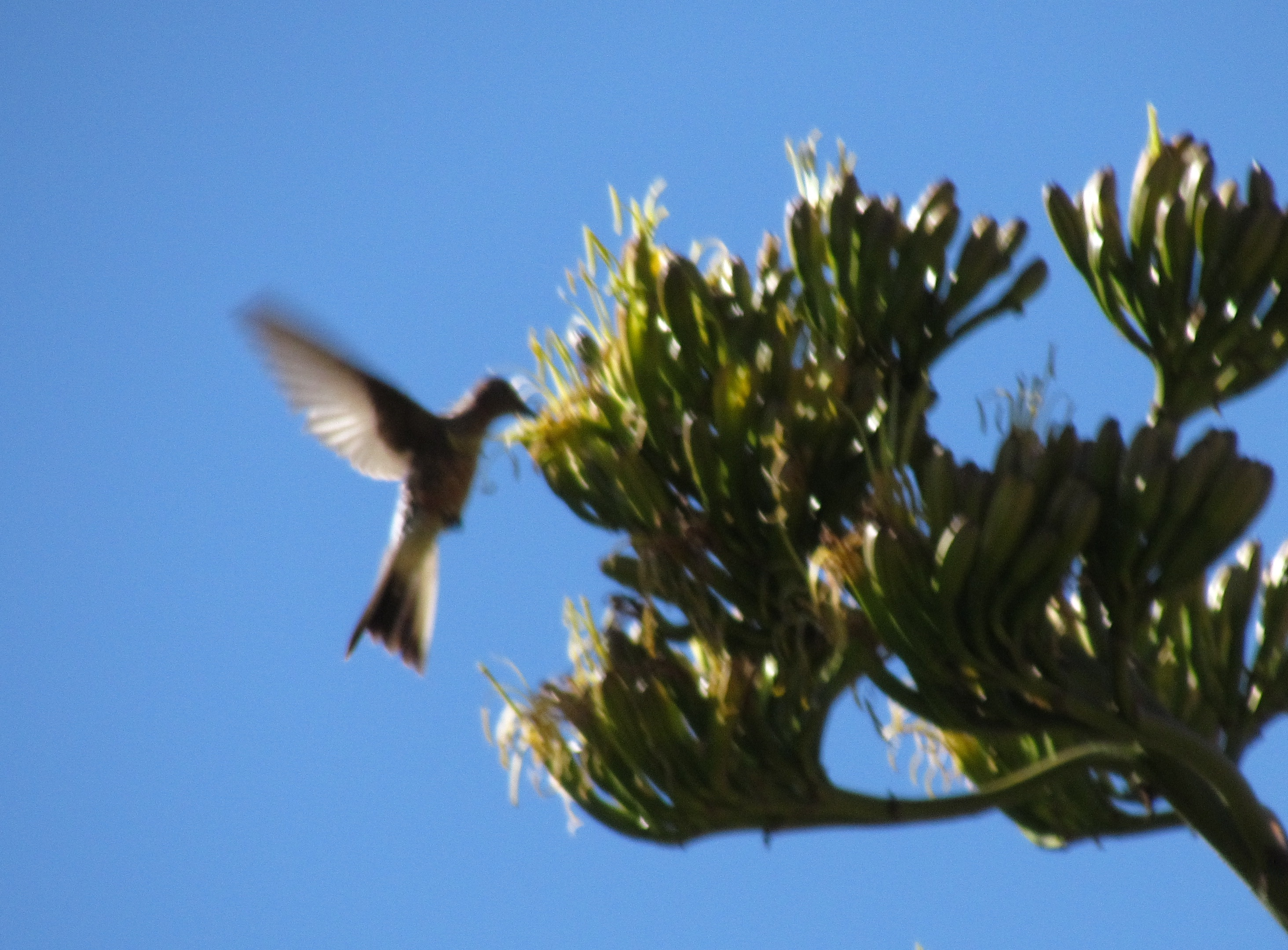 Picaflor en Aurahua